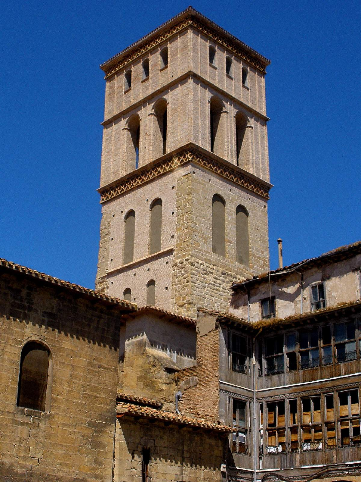 Iglesia de San Bartolomé, Logroño (La Rioja)